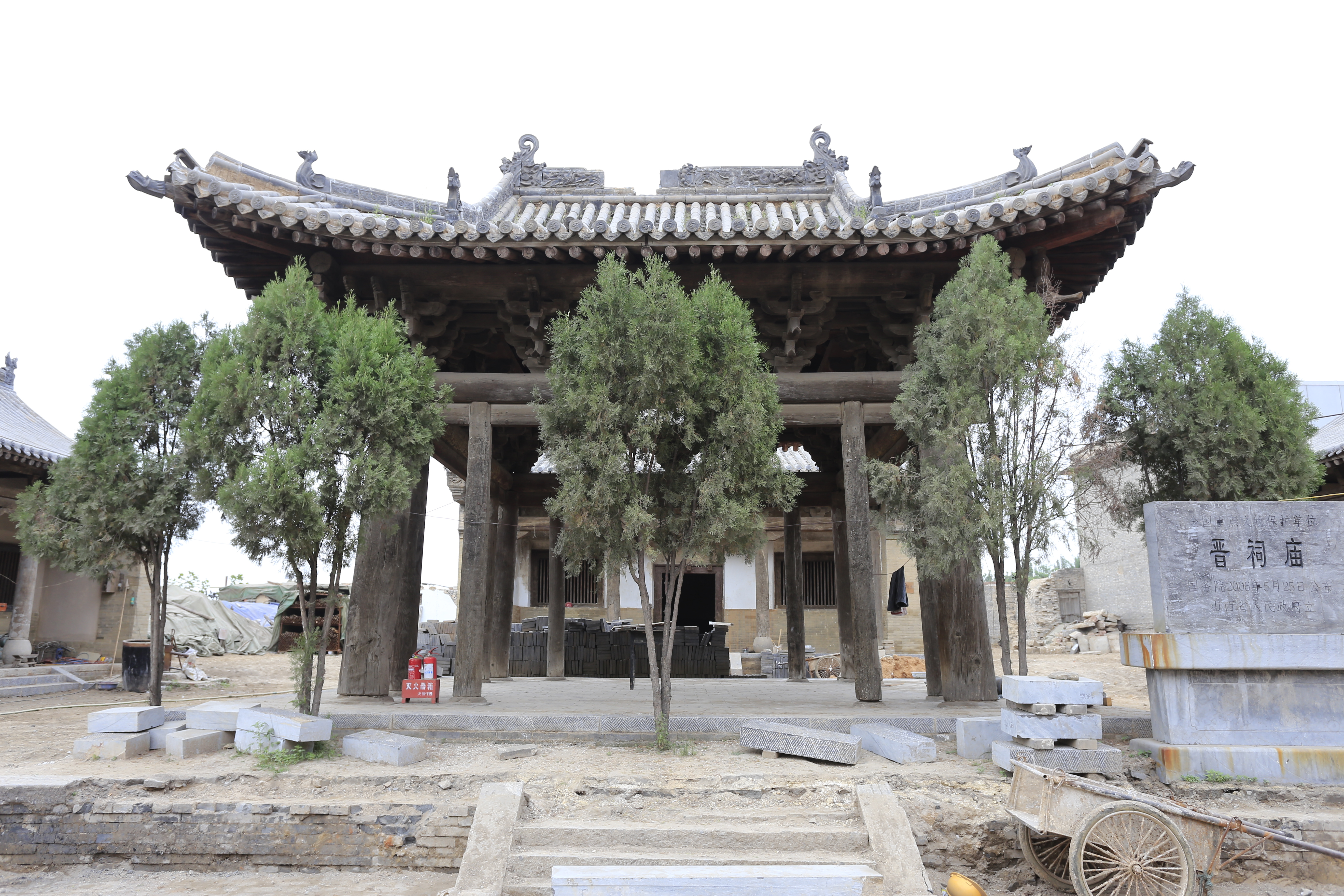 灵石县马和村晋祠庙 —— 献殿